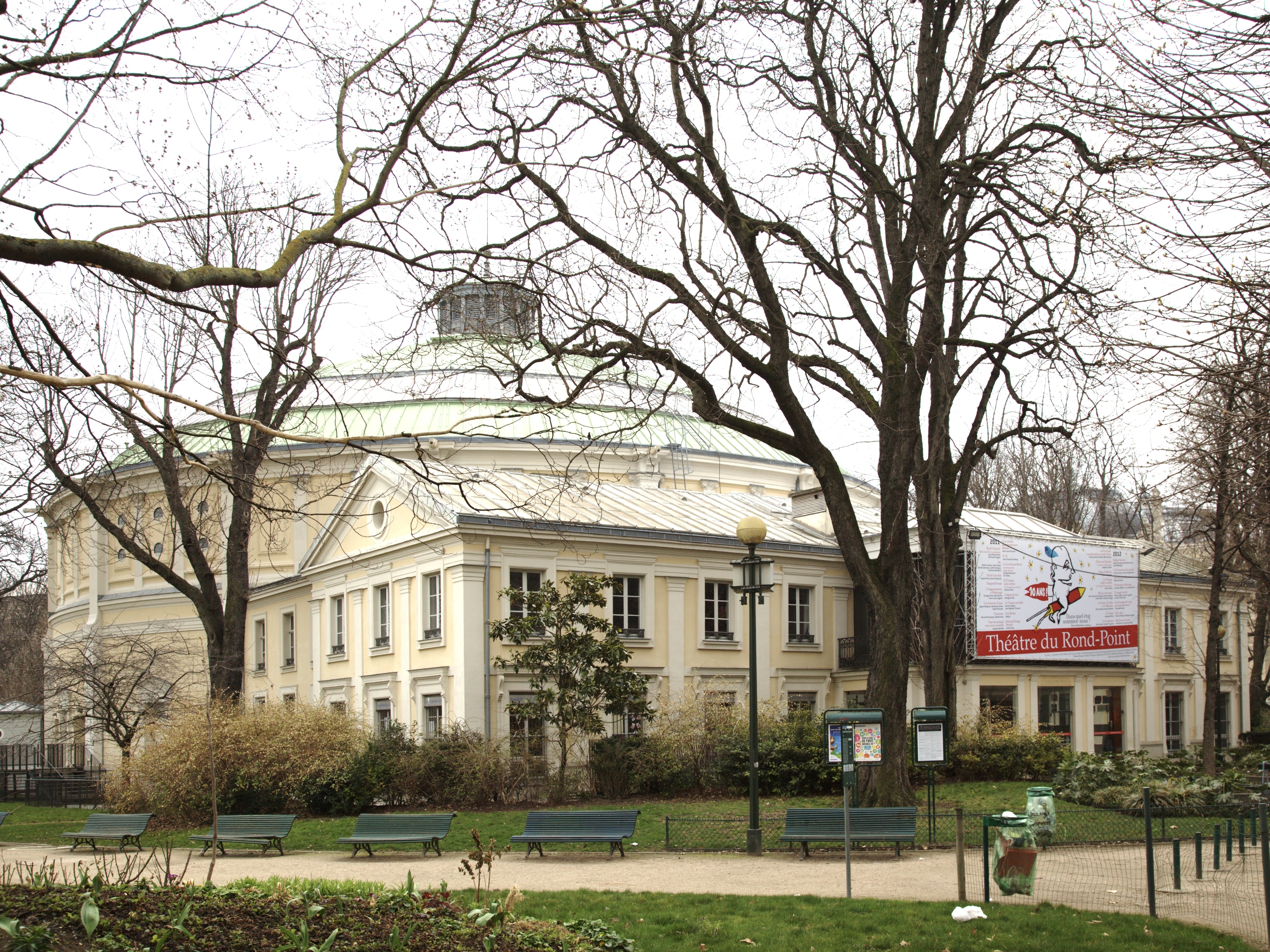 Le théatre du rond-point à Paris, vu depuis le rond-point des Champs-Élysées